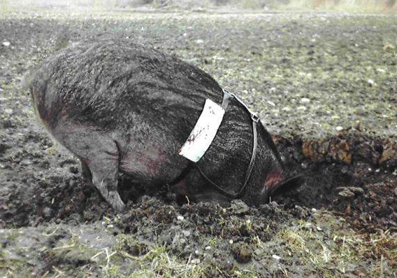 Wildschwein Luise beim Wühlen im Erdreich